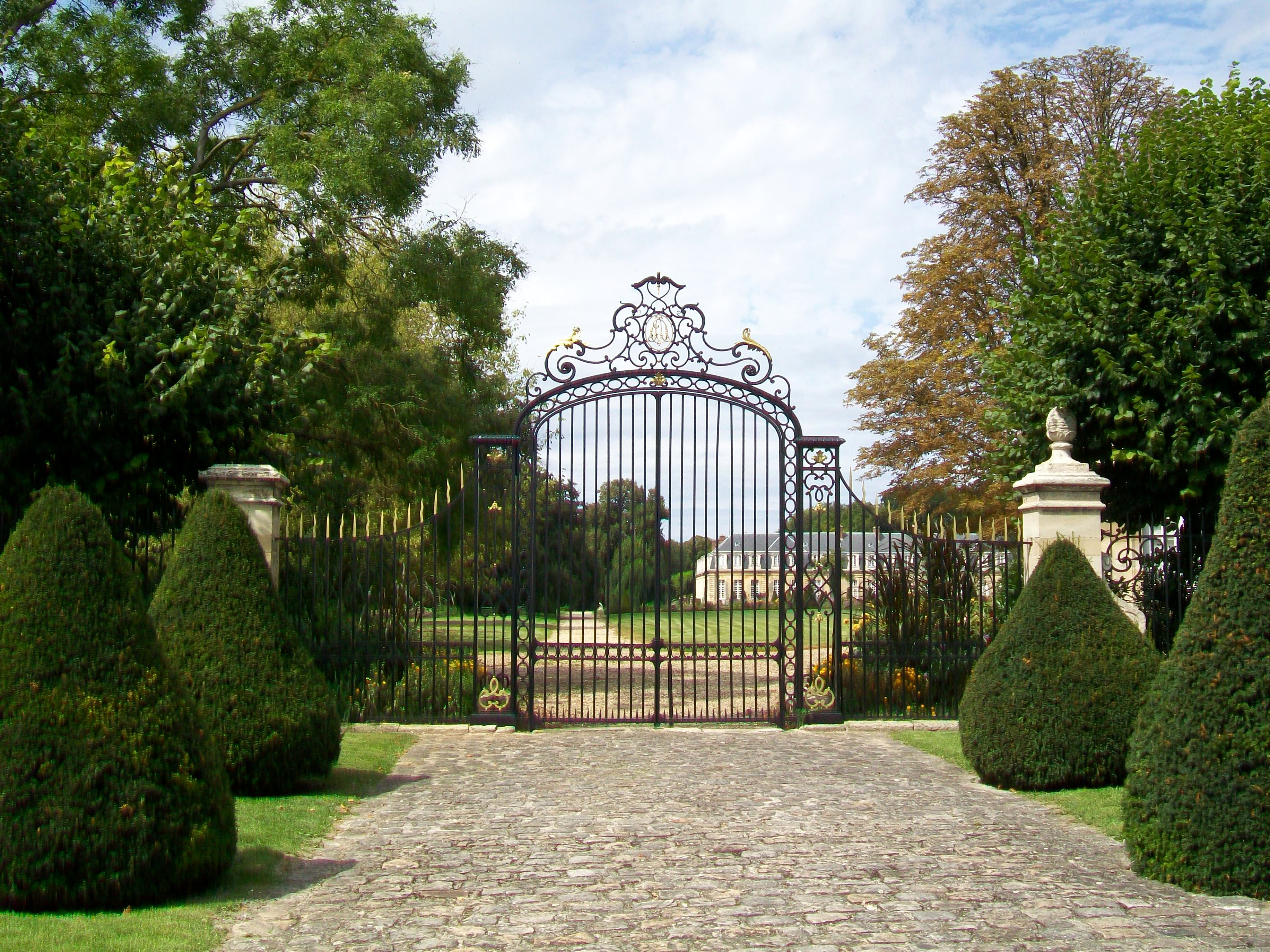 Grille du parc du château, au rond-point de la Victoire.